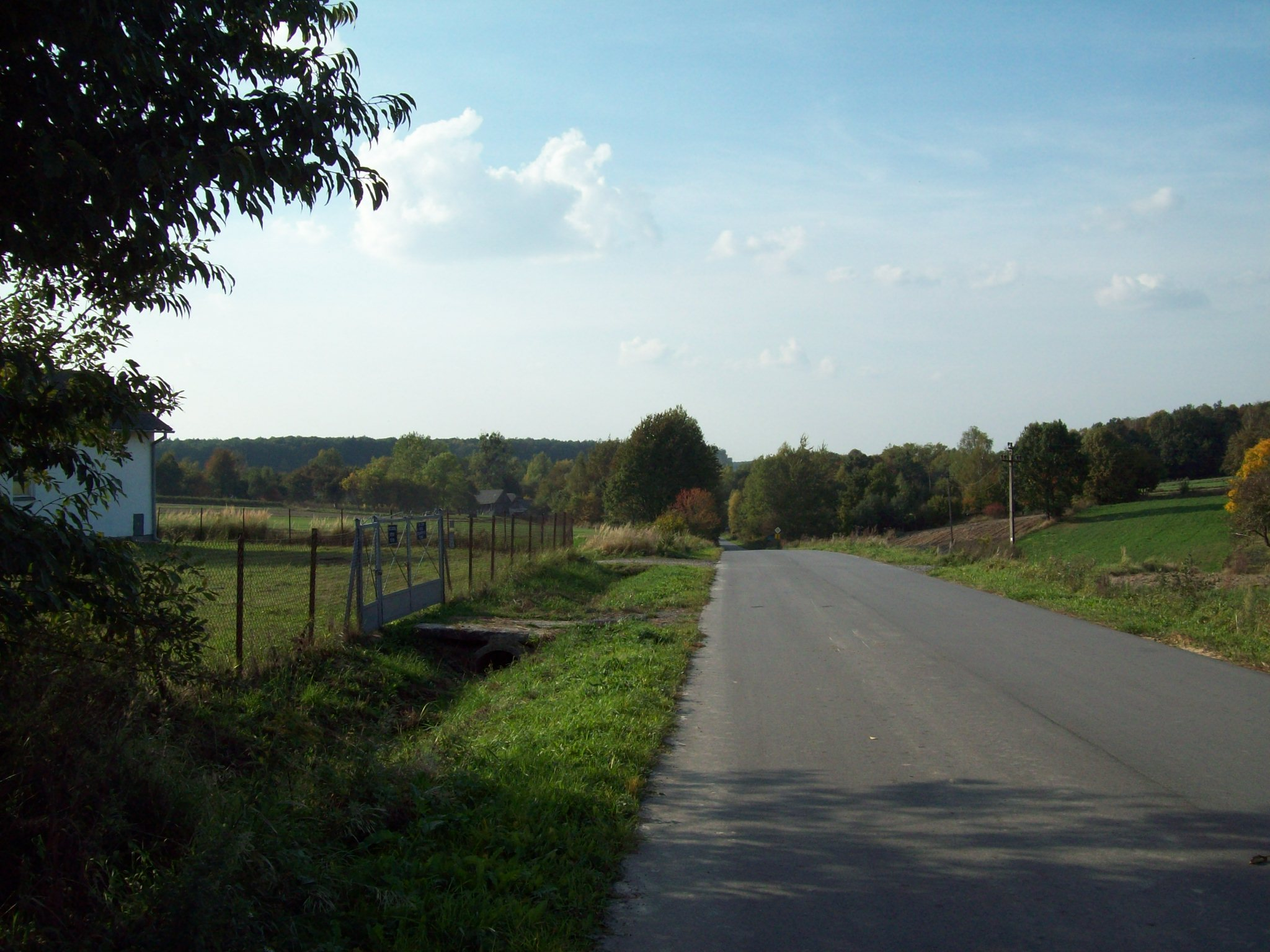 Droga przebiegająca przez Walentynów